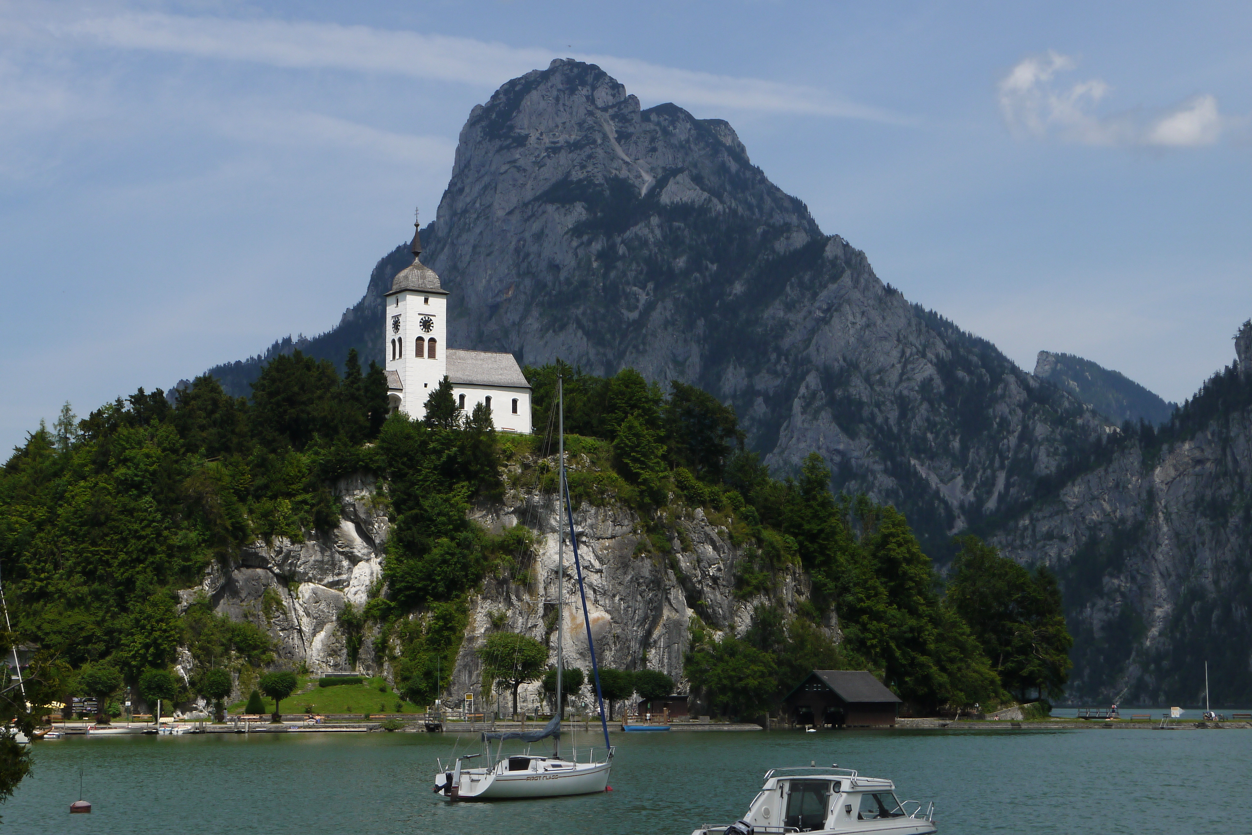 Kapelle hl. Johannes der Täufer This media shows the natural monument in Upper Austria with the ID nd353.